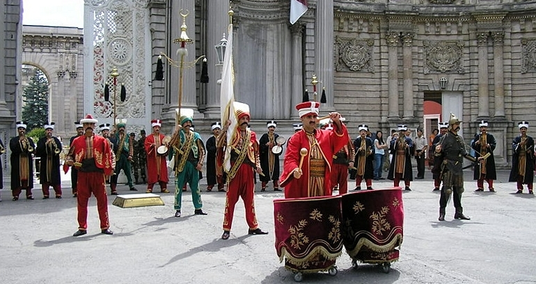 Es una parada a las puertas del palacio de Dolmabahce, en Estambul